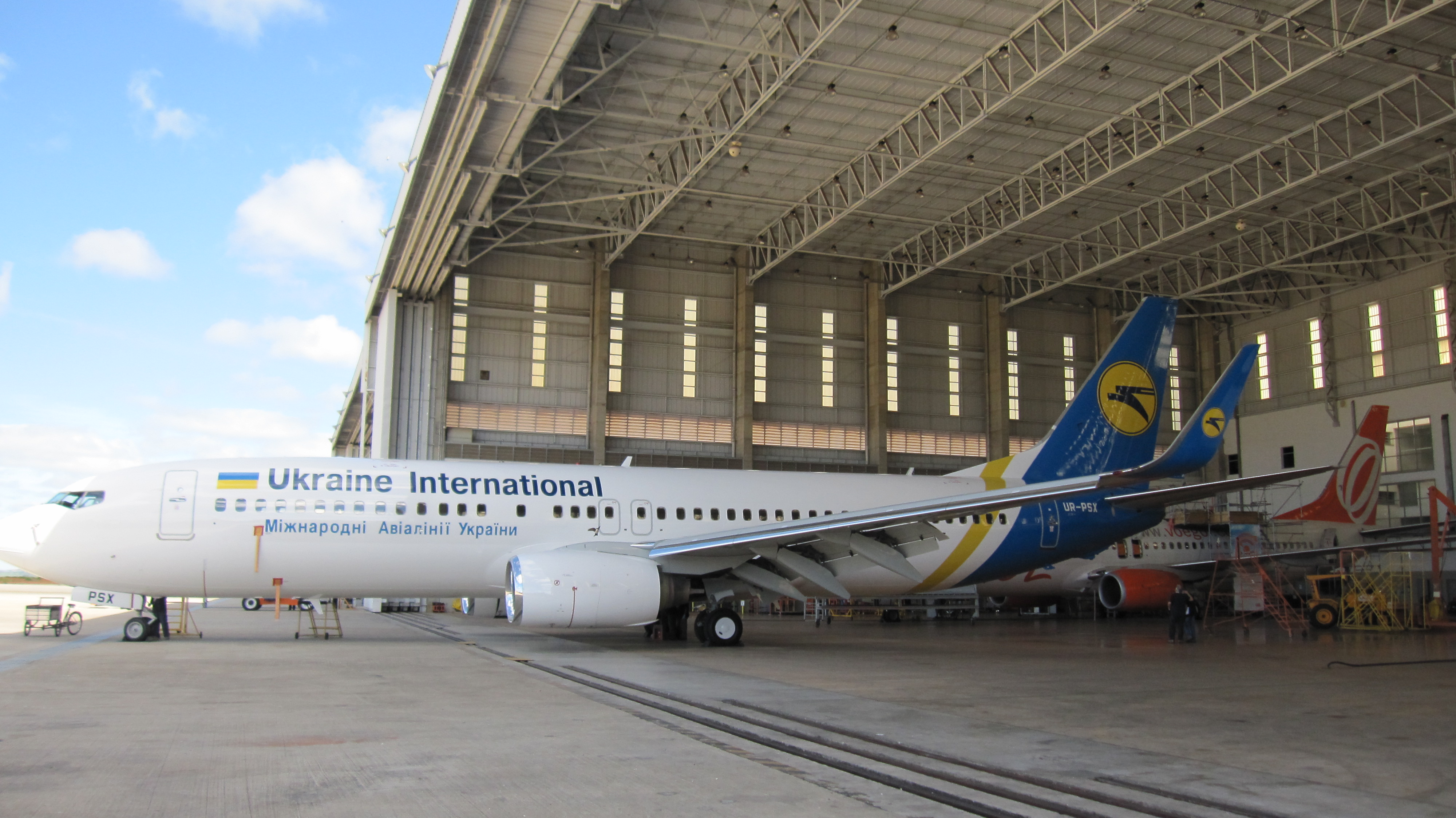 2017 ausgeliefert ab Werk B737-800